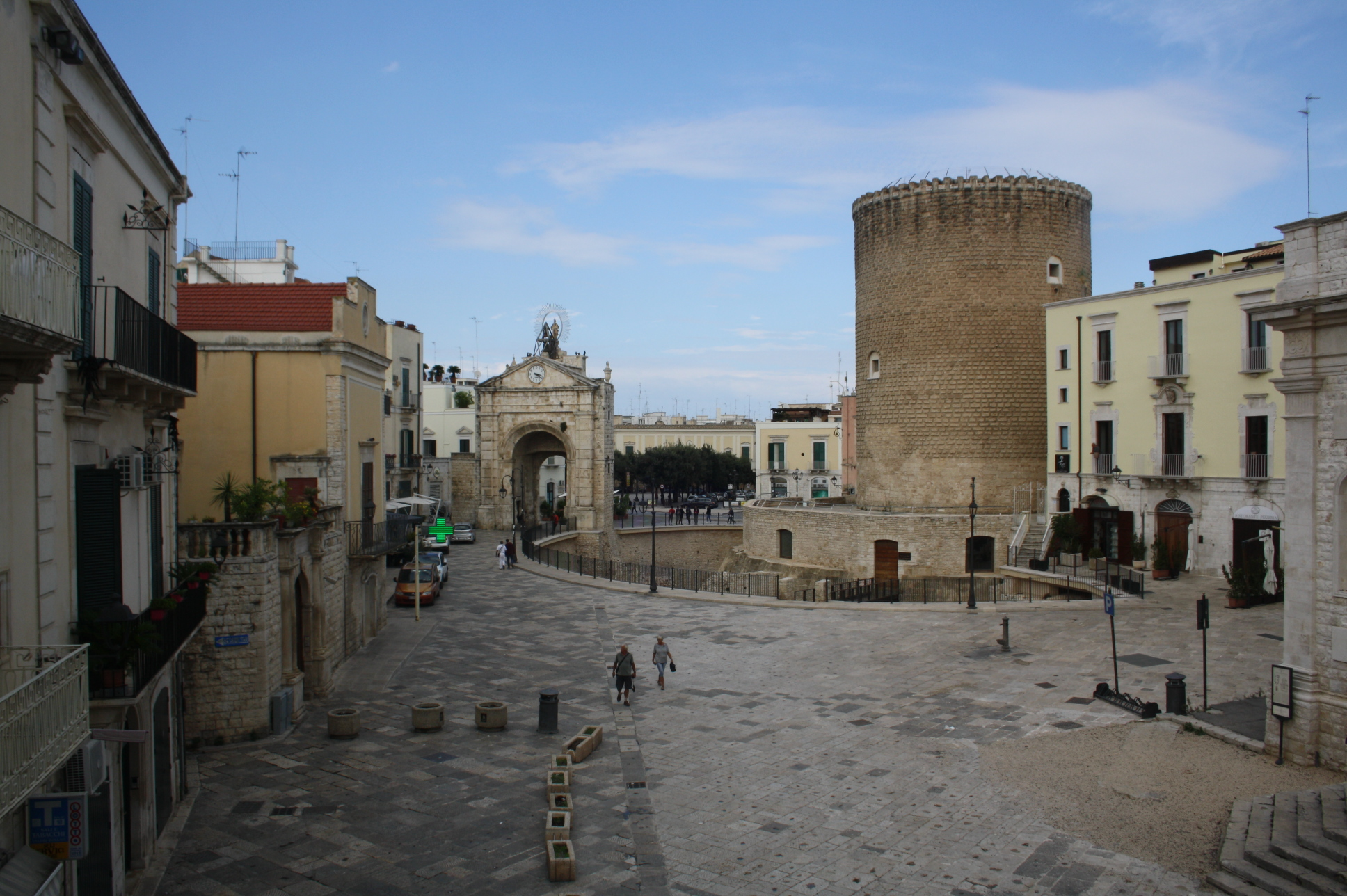 piazza Cavour This is a photo of a monument which is part of cultural heritage of Italy.